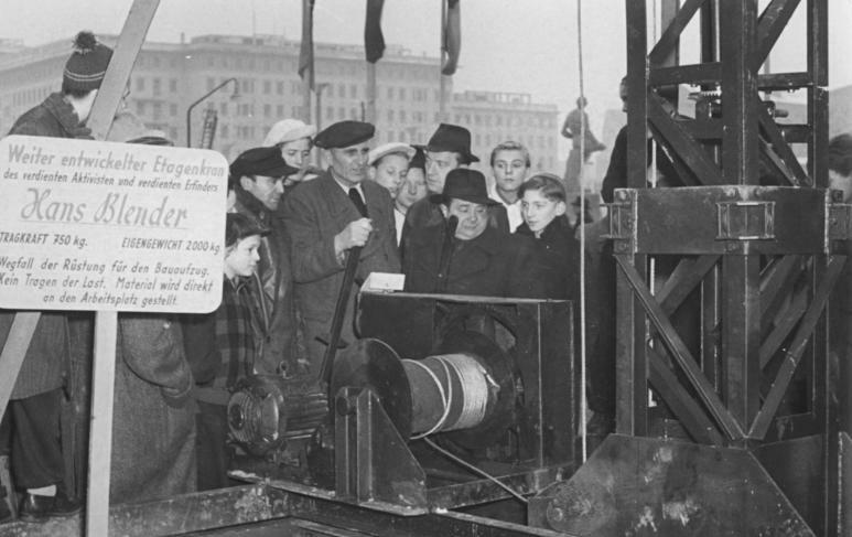 Zentralbild Sturm 27.11.1952 "Tag des sowjetischen Neuerers" in Berlin-Im Monat der Deutsch-Sowjetischen Freundschaft, am 27.11.1952 beging die werktätige Bevölkerung unserer Republik den "Tag des sowjetischen Neuerers" als Zeichen der Dankbarkeit gegenüber dem sowjetischen Volk, das seine Produktionserfahrungen den friedliebenden, demokratischen Völkern uneigenützig zur Verfügung stellt. Die IG Bau-Holz veranstaltete vor der Deutschen Sporthalle in der Stalinallee Berlin eine Ausstellung neuer Arbeitsgeräte, an denen Verdiente Erfinder und Aktivisten ihre Arbeitsweise verführten. UBz: Der Verdiente Erfinder und Verdiente Aktivist Hans Blender (mit Mütze) führt seinen weiterentwickelten Etagenkran vor.